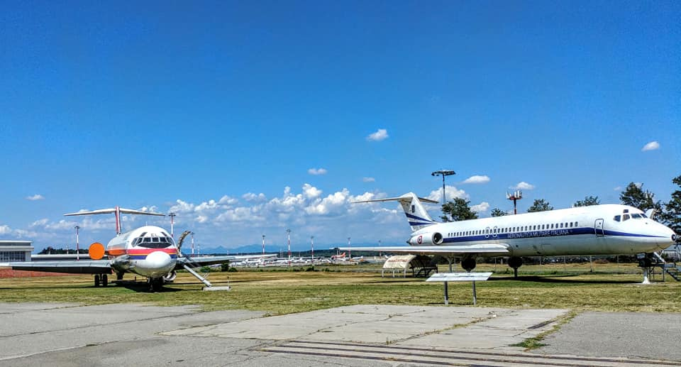 L'area esterna di Volandia con il DC9 presidenziale e l'Md 80